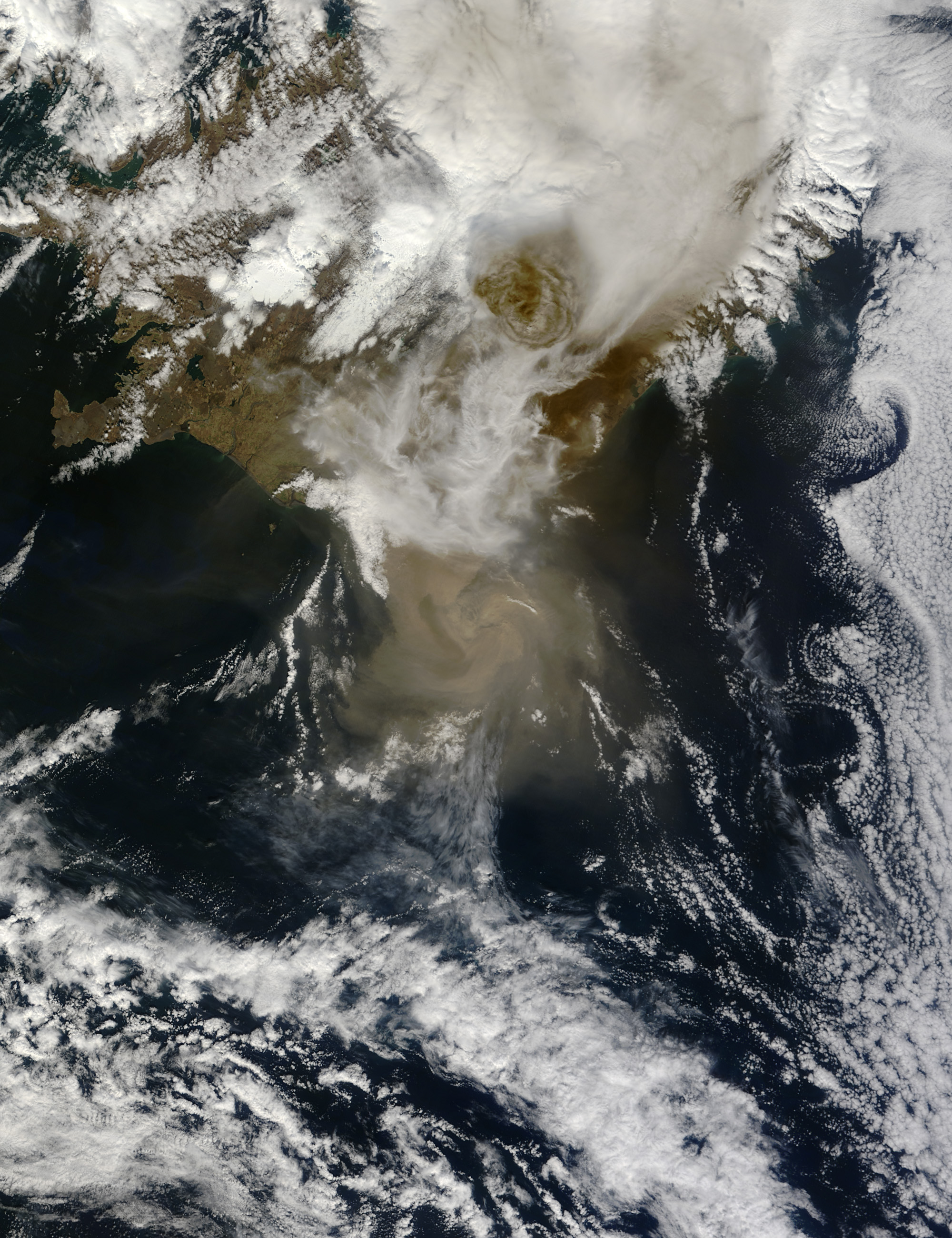 Volcán de Islandia Grímsvötn